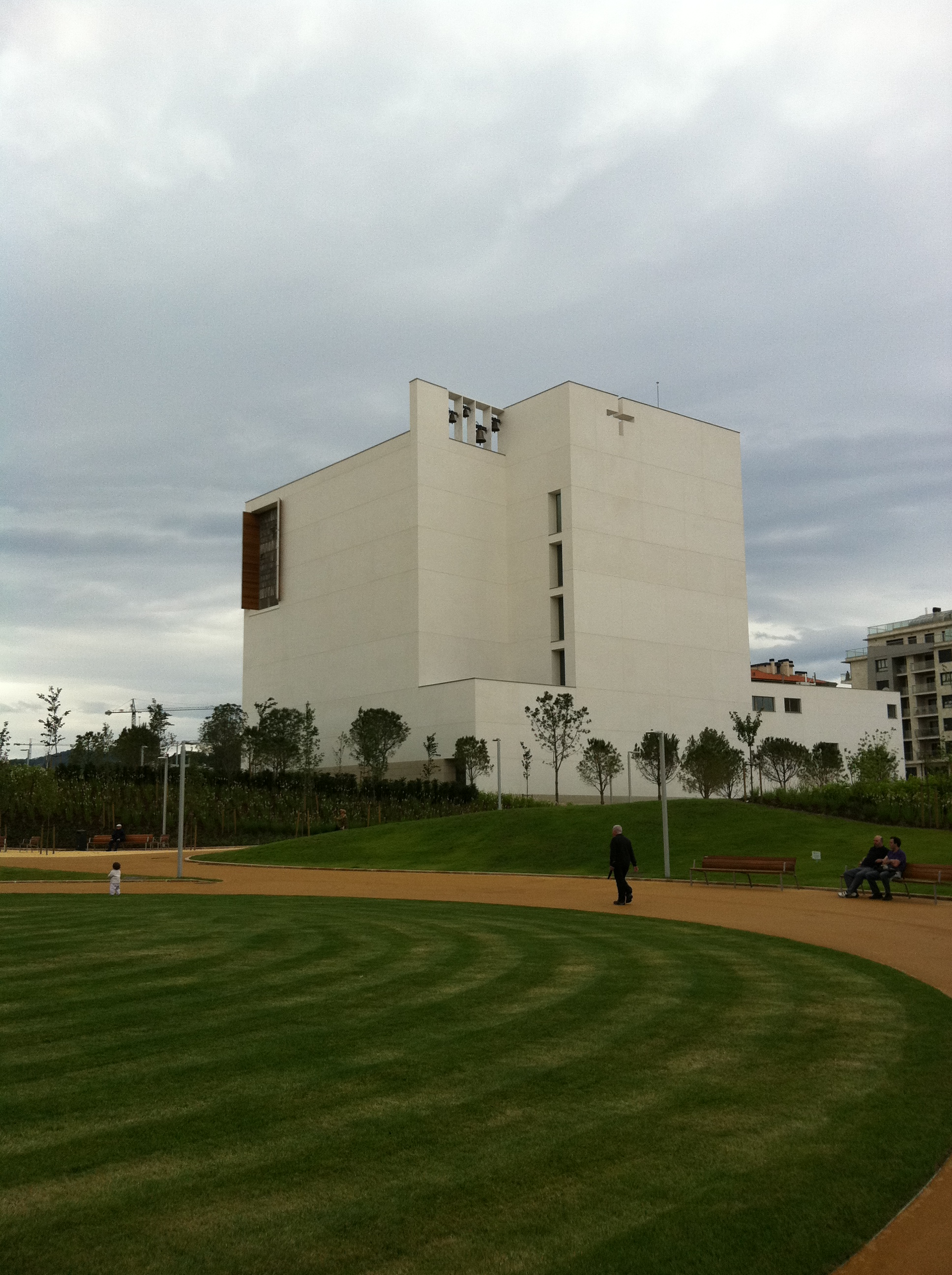 Iglesia de IESU, vista desde el Parque de la Memoria en la Avda. de Barcelona de Donostia San Sebastián. Obra de Rafael Moneo